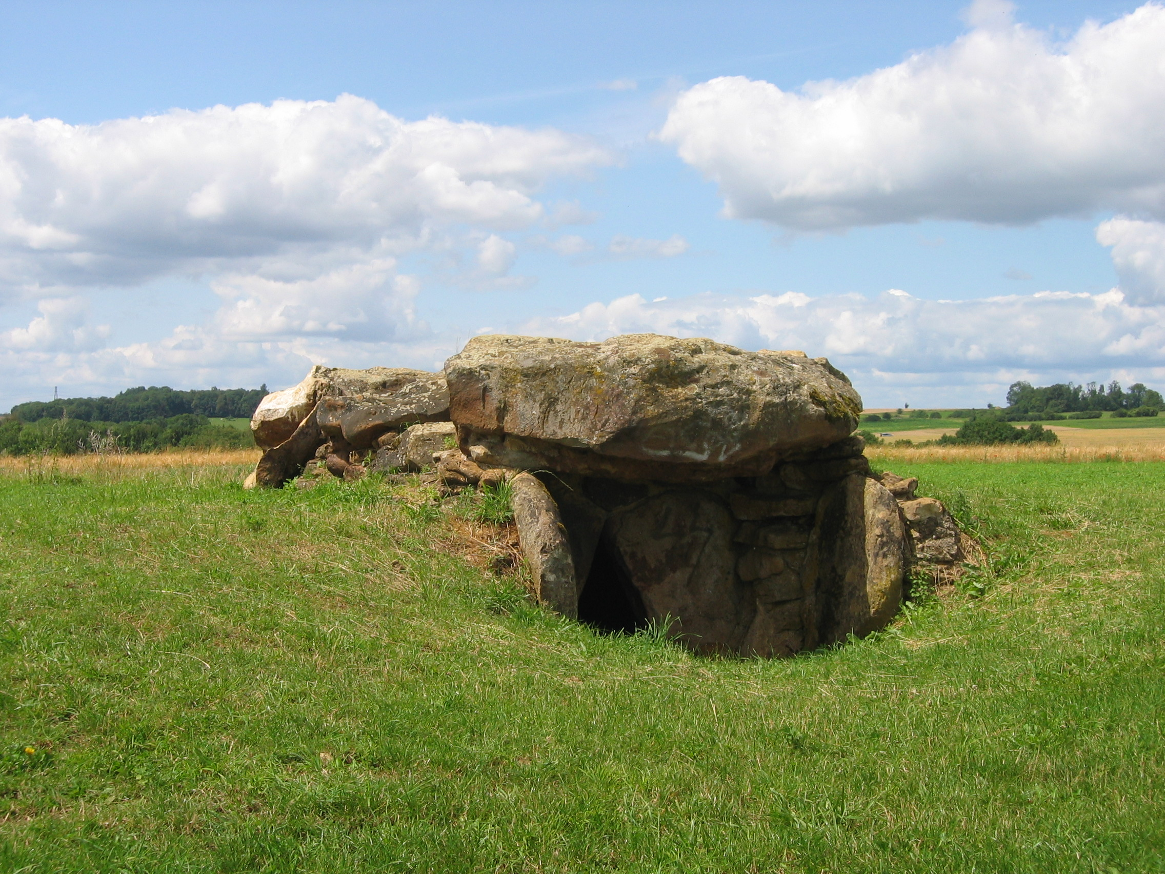 Allée couverte de Giraumont appelée encore dolmen de la Ganguille - Commune de Saint-Marcel - Ardennes - France - Vue 3